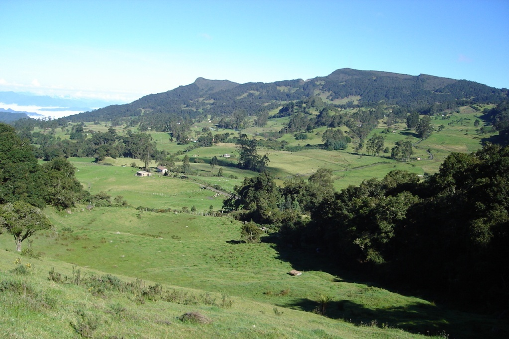 Vista panorámica de la vereda Sabaneta del Municipio de Maripí Boyacá Colombia